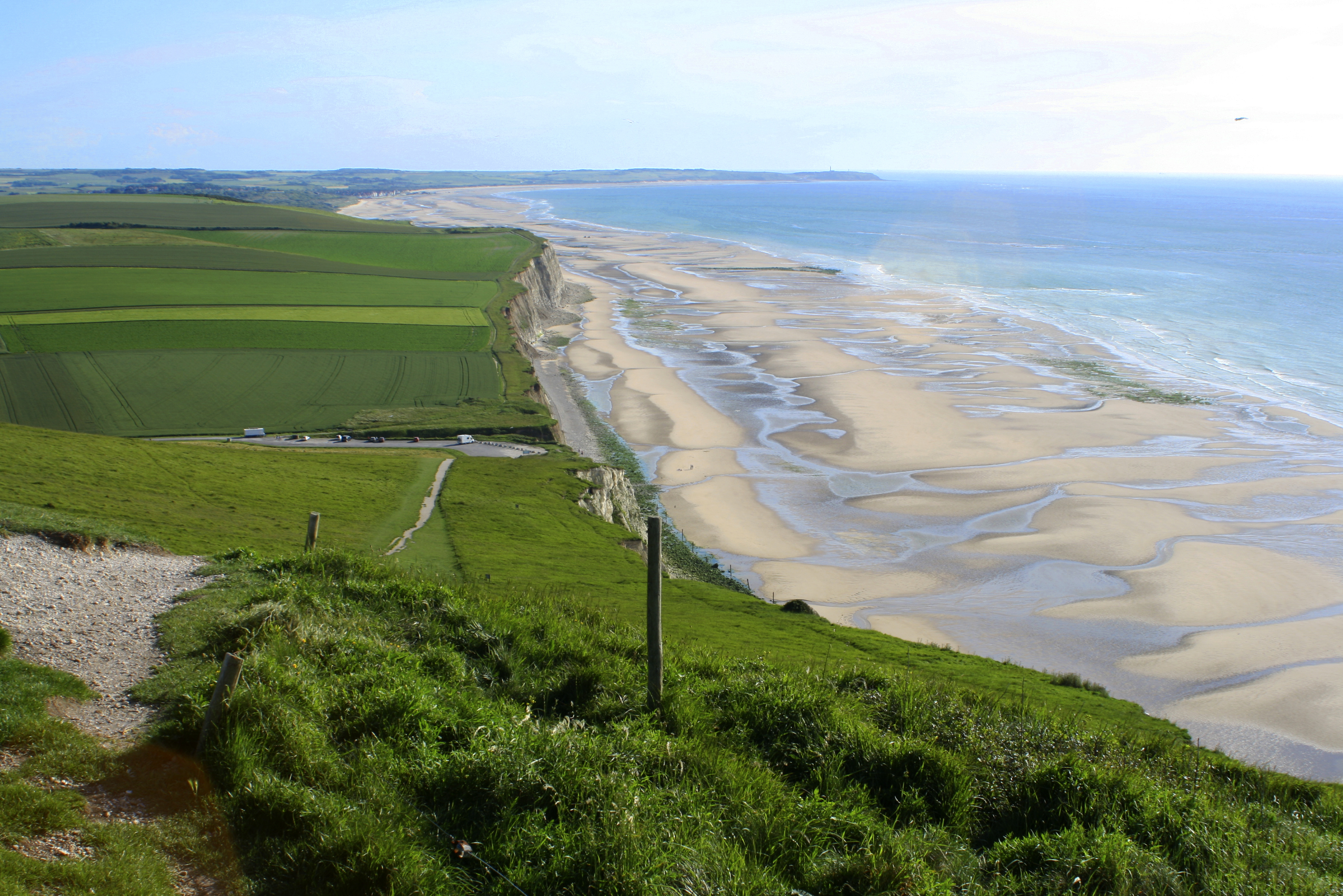 cote d'opale Calais (Francia)